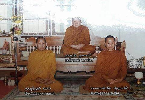 หลวงปู่บุญเพ็ง หลวงปู่สิม หลวงปู่เปลี่ยน